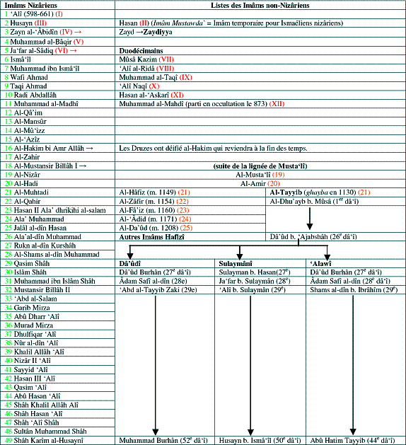 List of Nizari Imams, Diane Steigerwald Removed watermark read: Auteure: Diane Steigerwald, 2007